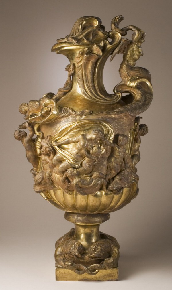 М Soldani Galatea Vase 1695.jpg: золочена теракота